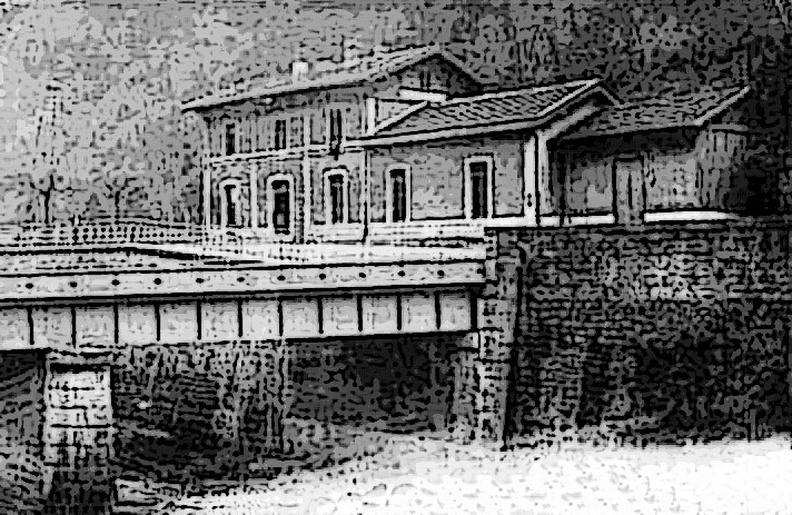 Gare de Tenay, dans l'Ain, sur la ligne Lyon - Genève, dans son aspect à la fin 19ème ou début 20ème siècle.